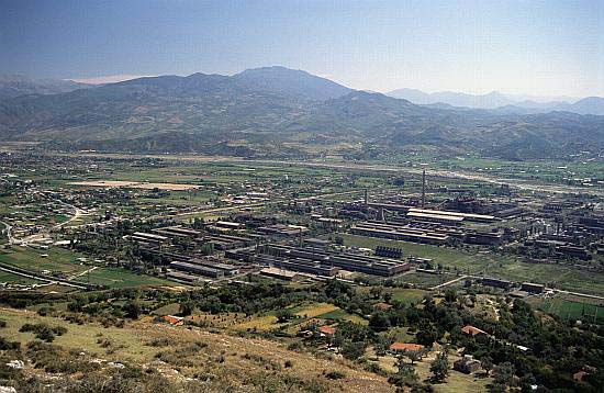 Elbasan (Albania)